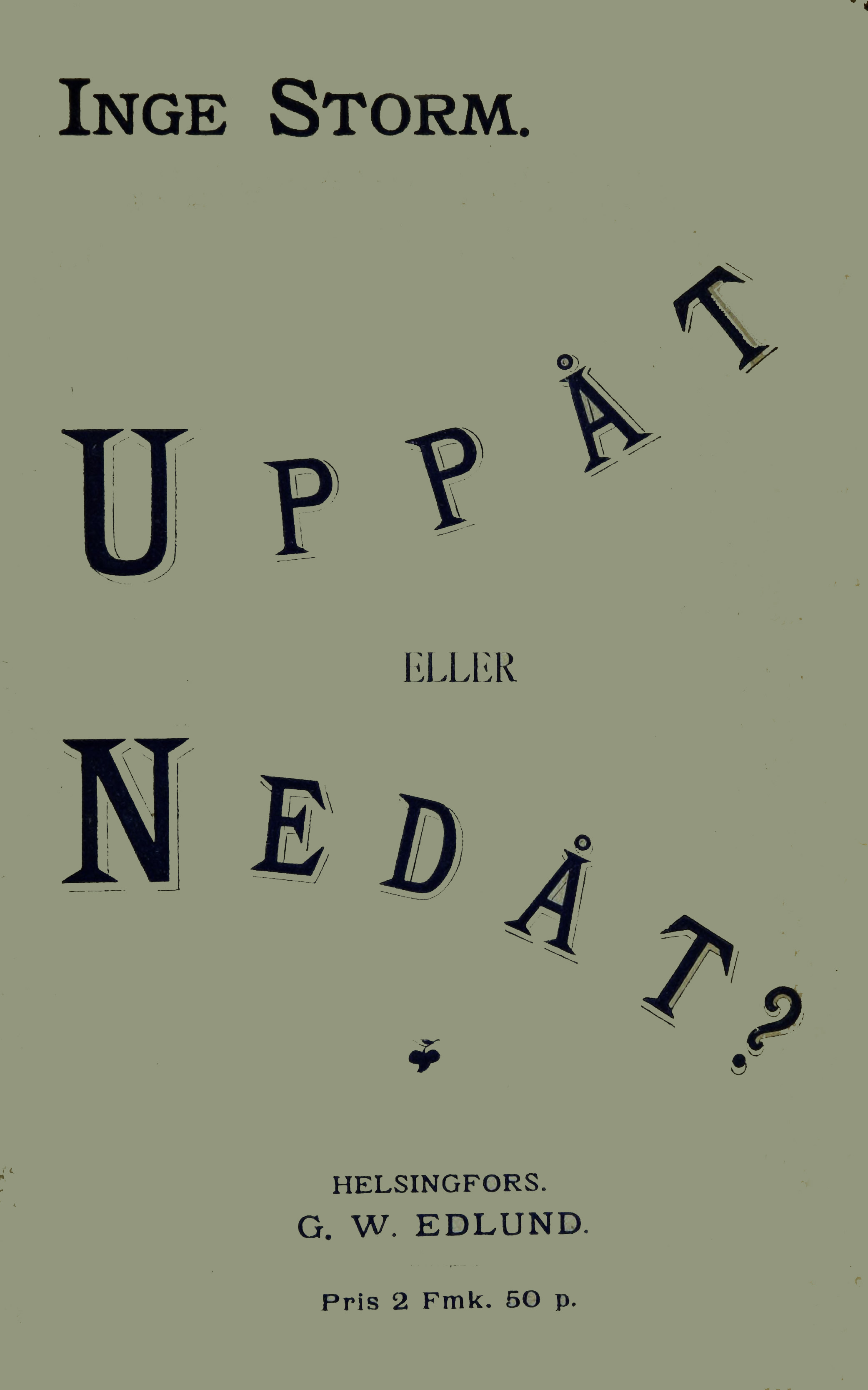 Book cover: Weman, Adèle: Uppåt eller nedåt. Publ. under pseudonym Inge Storm